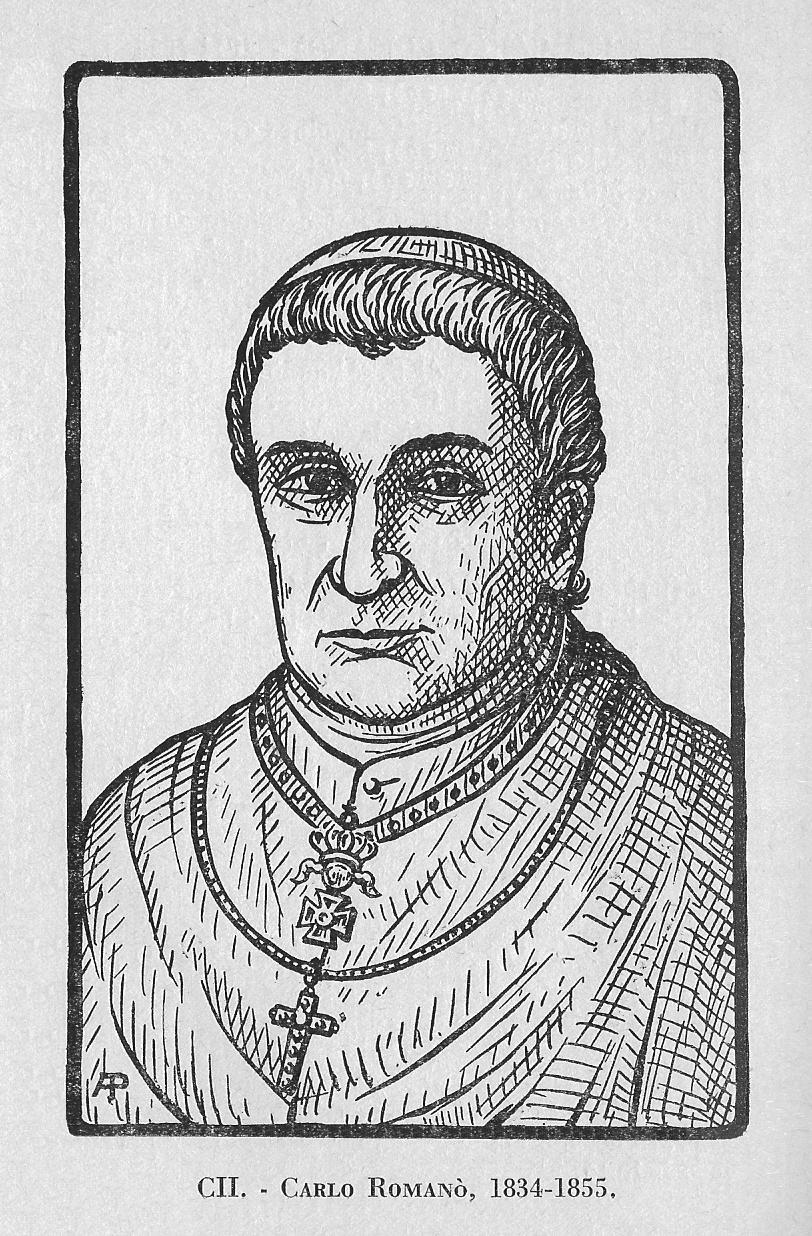 ritratto di Carlo Romanò, vescovo di Como, 1834-1855